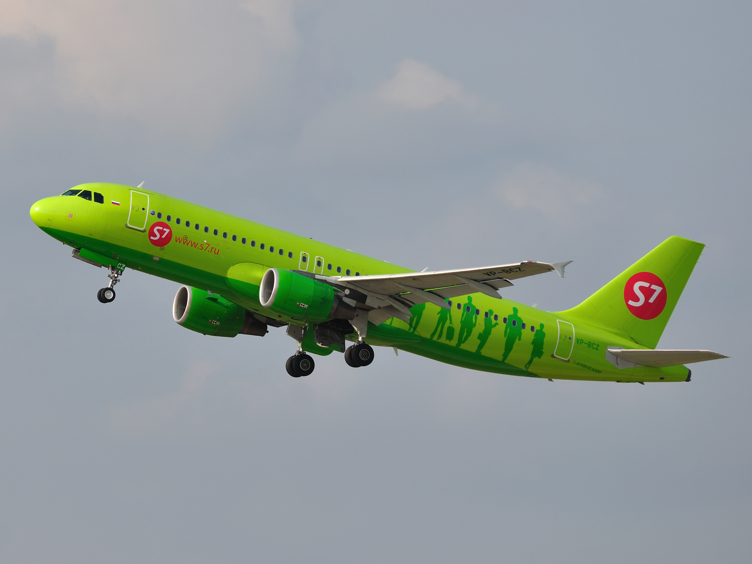 S7 Siberia Airlines A320-214 VP-BCZ